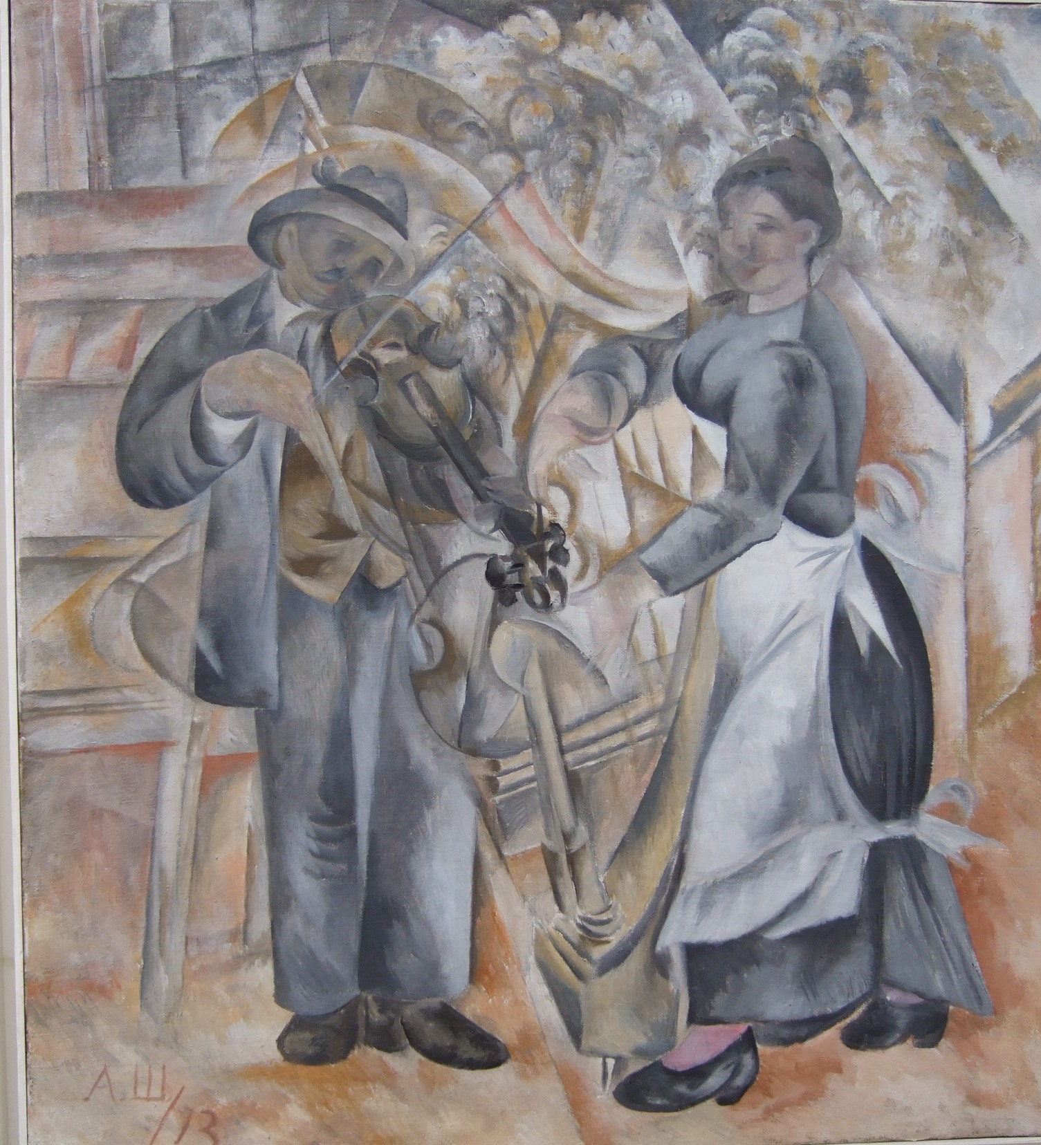 Musicians